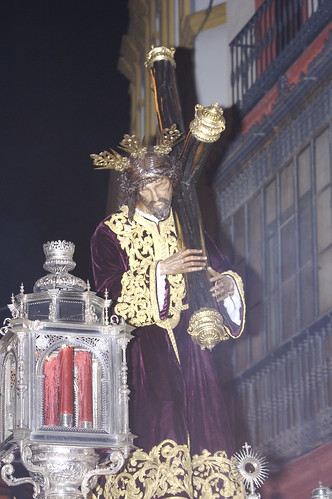 Cristo de la Divina Misericordia. Semana Santa en Sevilla. Año 2007 Foto realizada y propiedad de Ángel Chacón